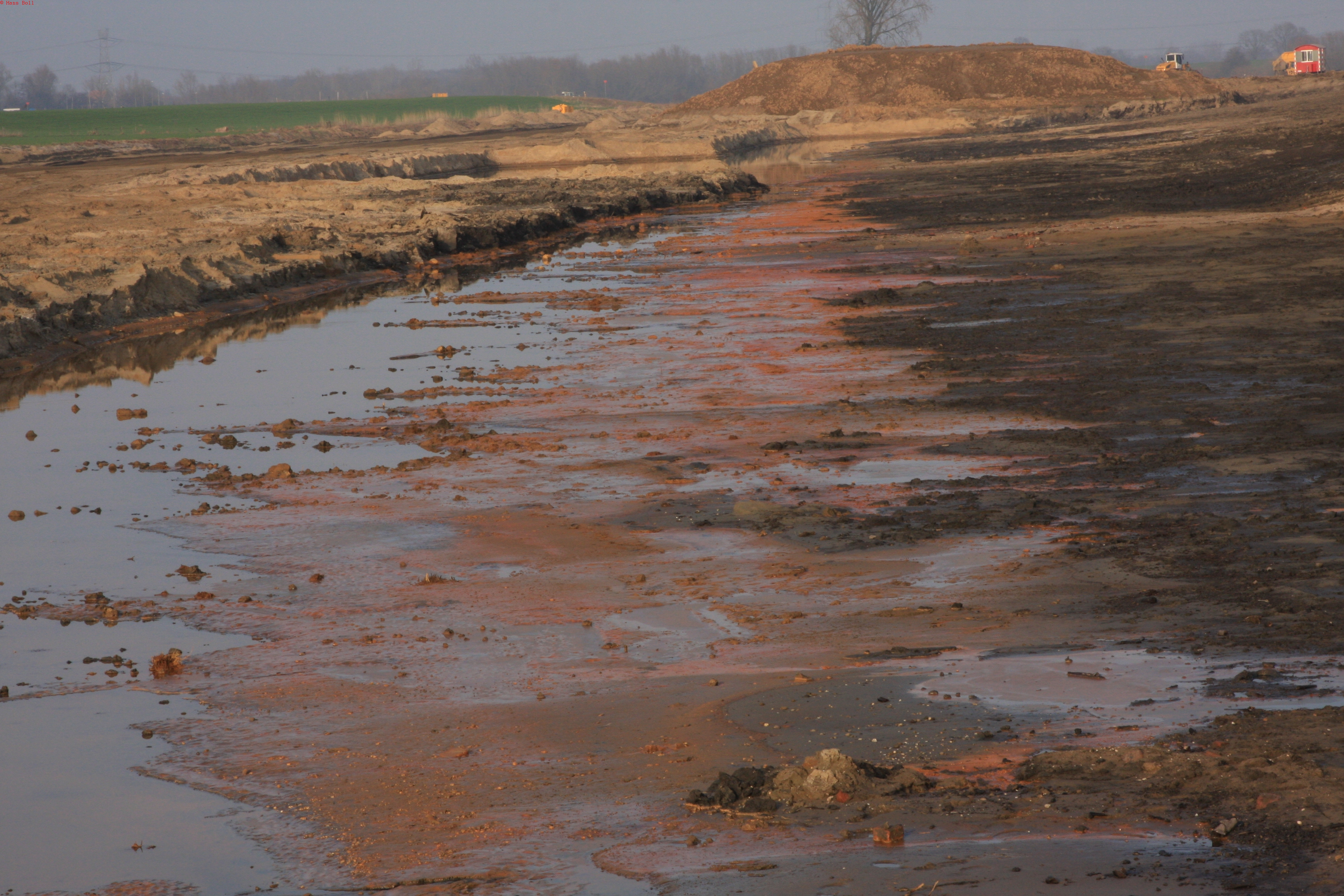 Bij de ontgraving komt ijzerijk grondwater in contact met de lucht (zuurstof) en verroest. Bacteriën veroorzaken daarbij uiteenlopende kleuren.